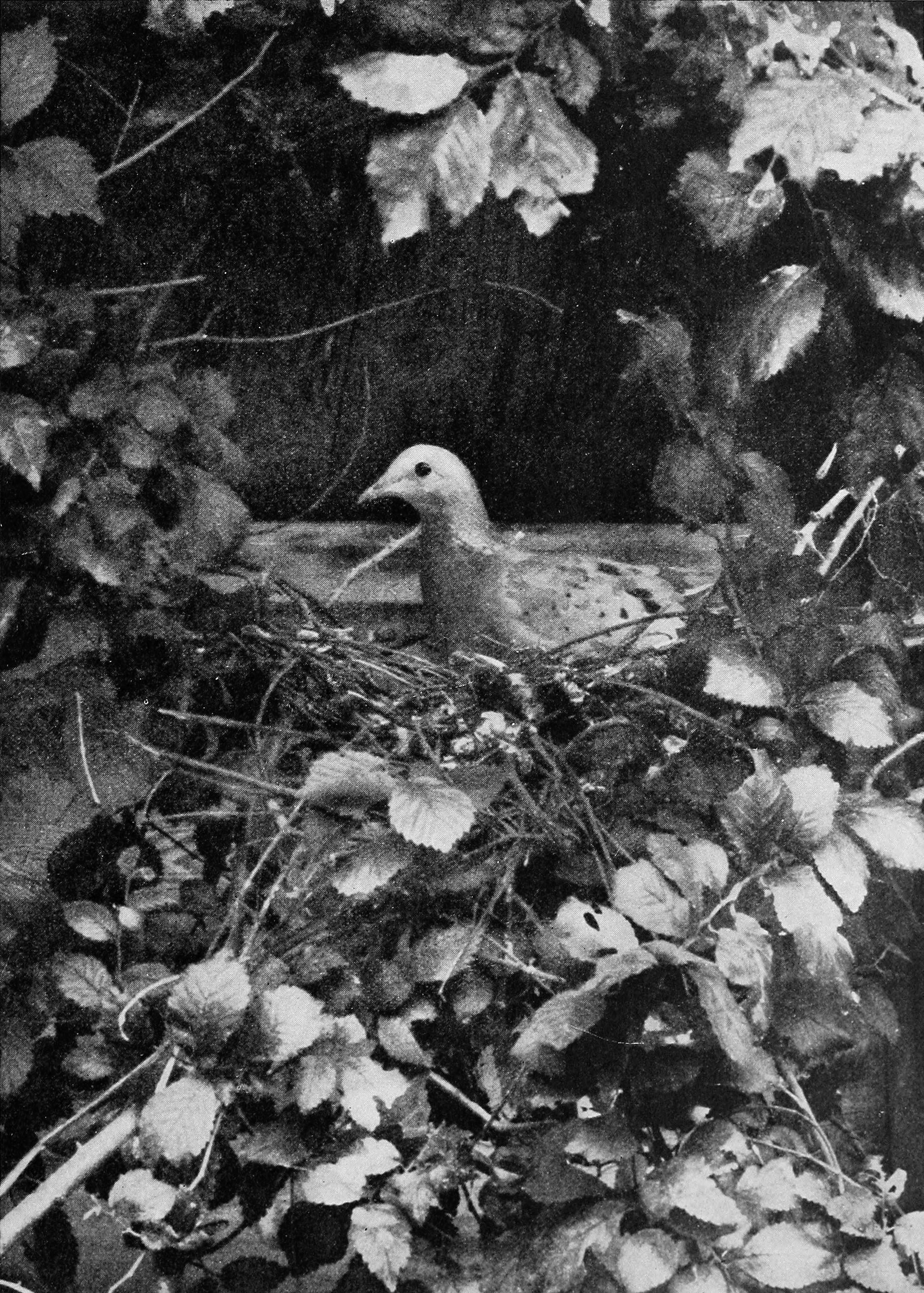 Nesting passenger pigeon.